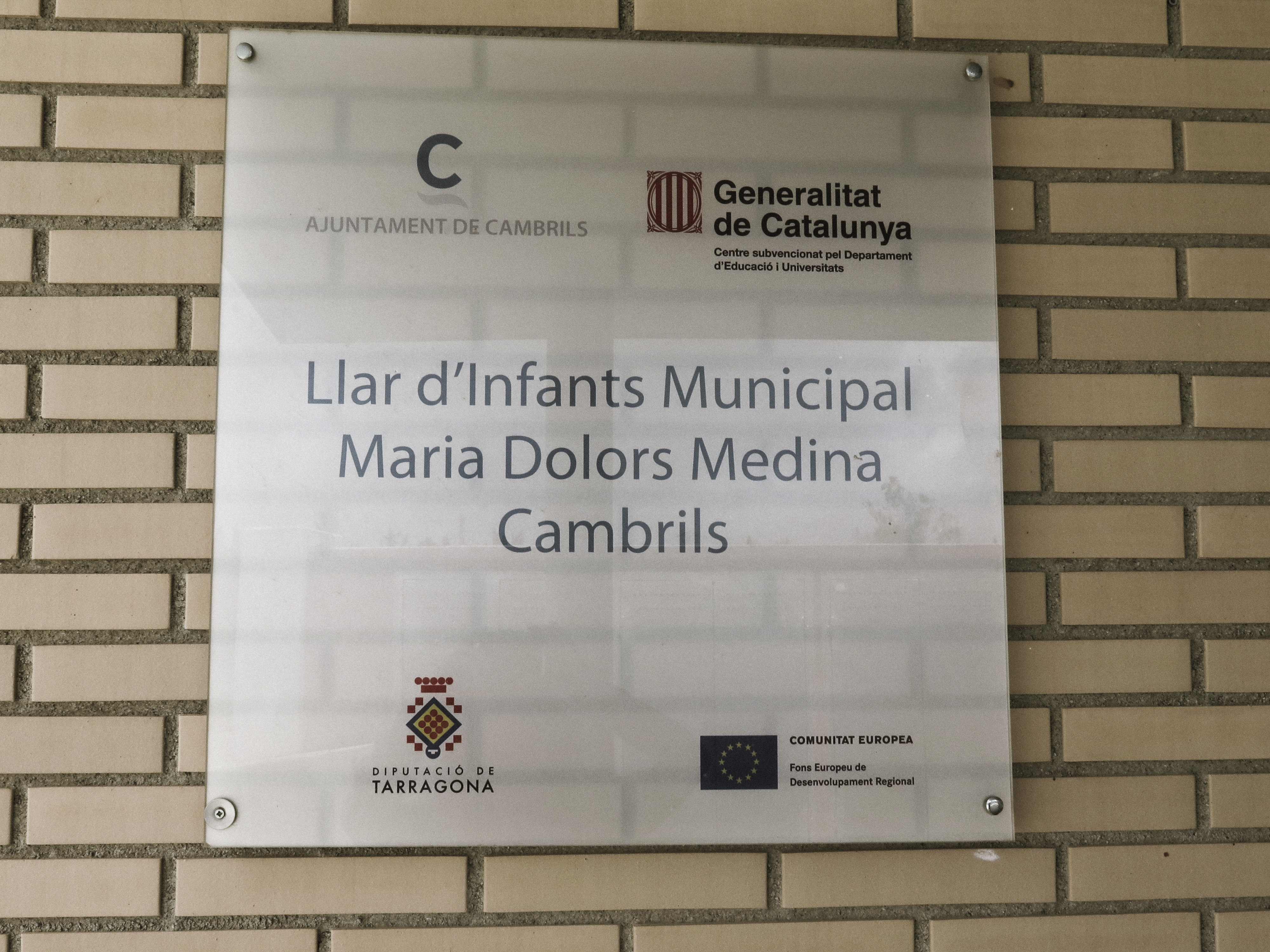 Placa situada a l'entrada de la "Llar d'Infants Municipal Maria Dolors Medina"